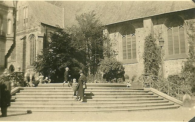 Brunneneinfassung des Bismarckbrunnens auf dem Südermarkt 1936 – Tante